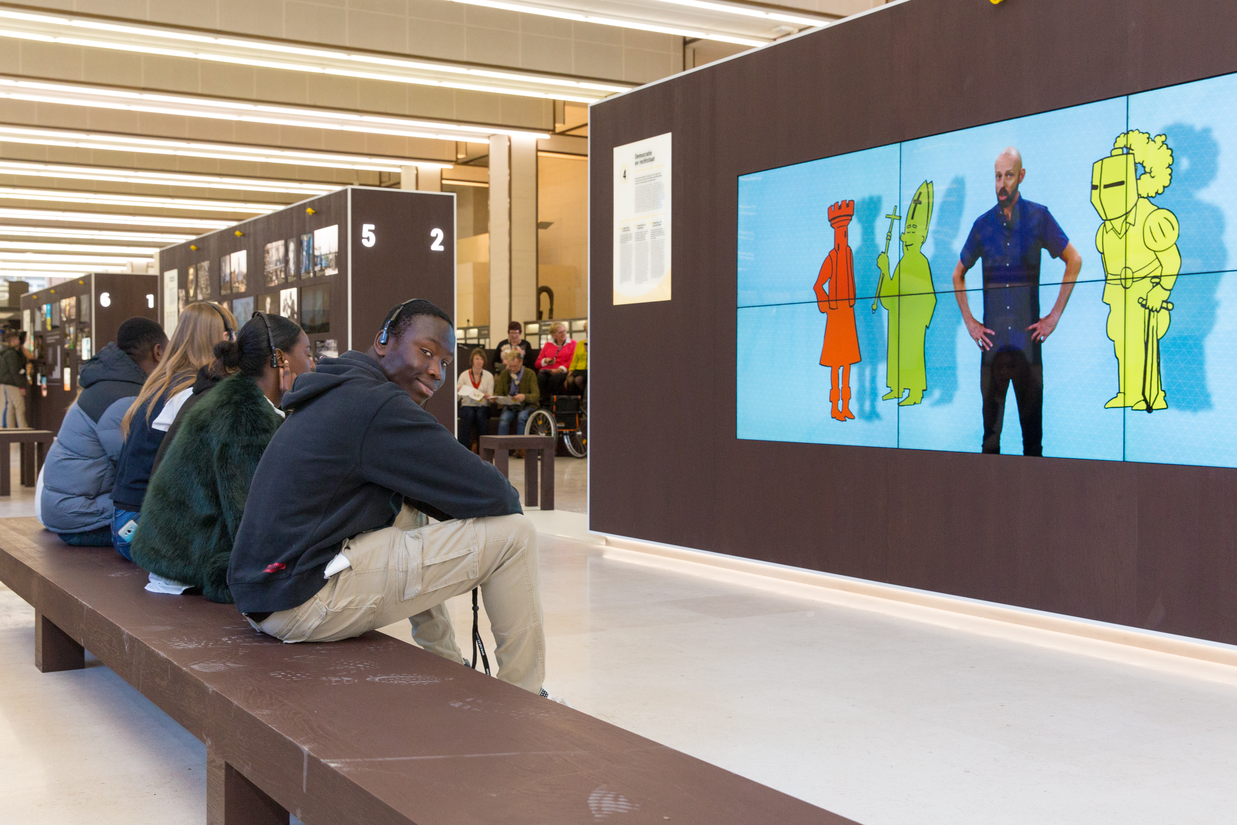 Er werd een fotoshoot gehouden met een school. Hier zien we jongeren die het Bezoekerscentrum Vlaams Parlement ontdekken.